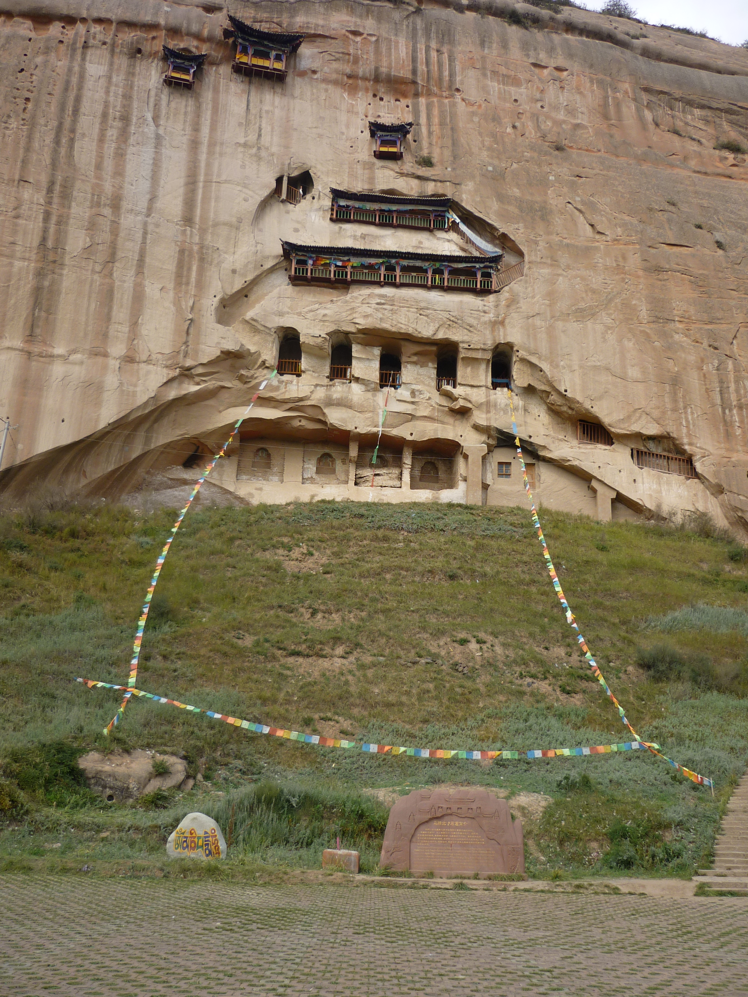 Die Matisi-Grotten (马蹄寺石窟群) sind buddhistische Höhlentempel am Westufer des Mati-Flusses bei der Stadt Zhangye in der chinesischen Provinz Gansu.